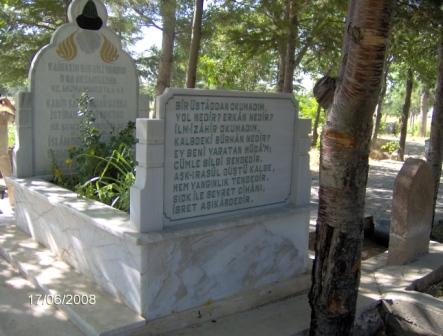 Ladik, Sarayönü